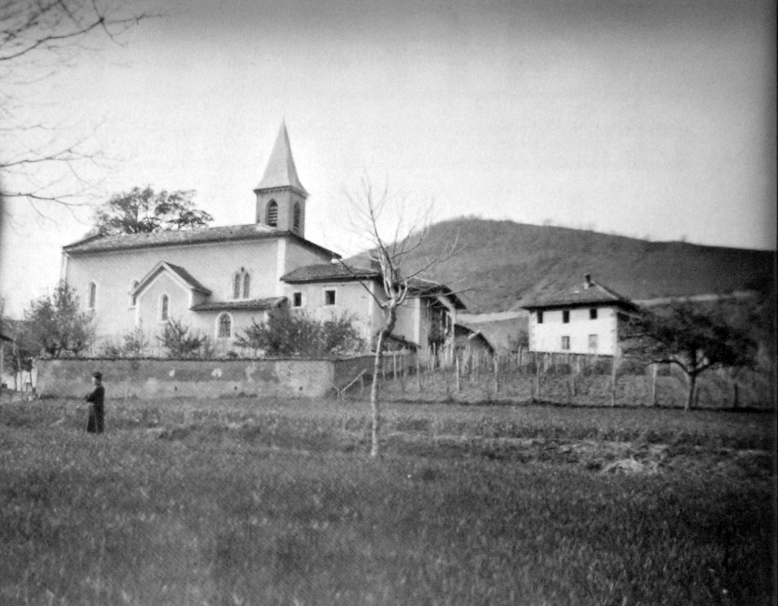 L'église Notre Dame de Quincieu au début du XX siècle. Elle a disparu. Quincieu, Isère, AuRA, France.